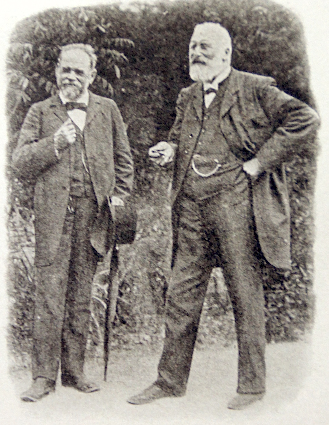 Präsident und Vizepräsident der Antiquarischen Gesellschaft Zürich: Gerold Meyer von Knonau (Historiker) (links) und Johann Rudolf Rahn um 1905 Offsetdruck um 1913 nach einer Fotografie